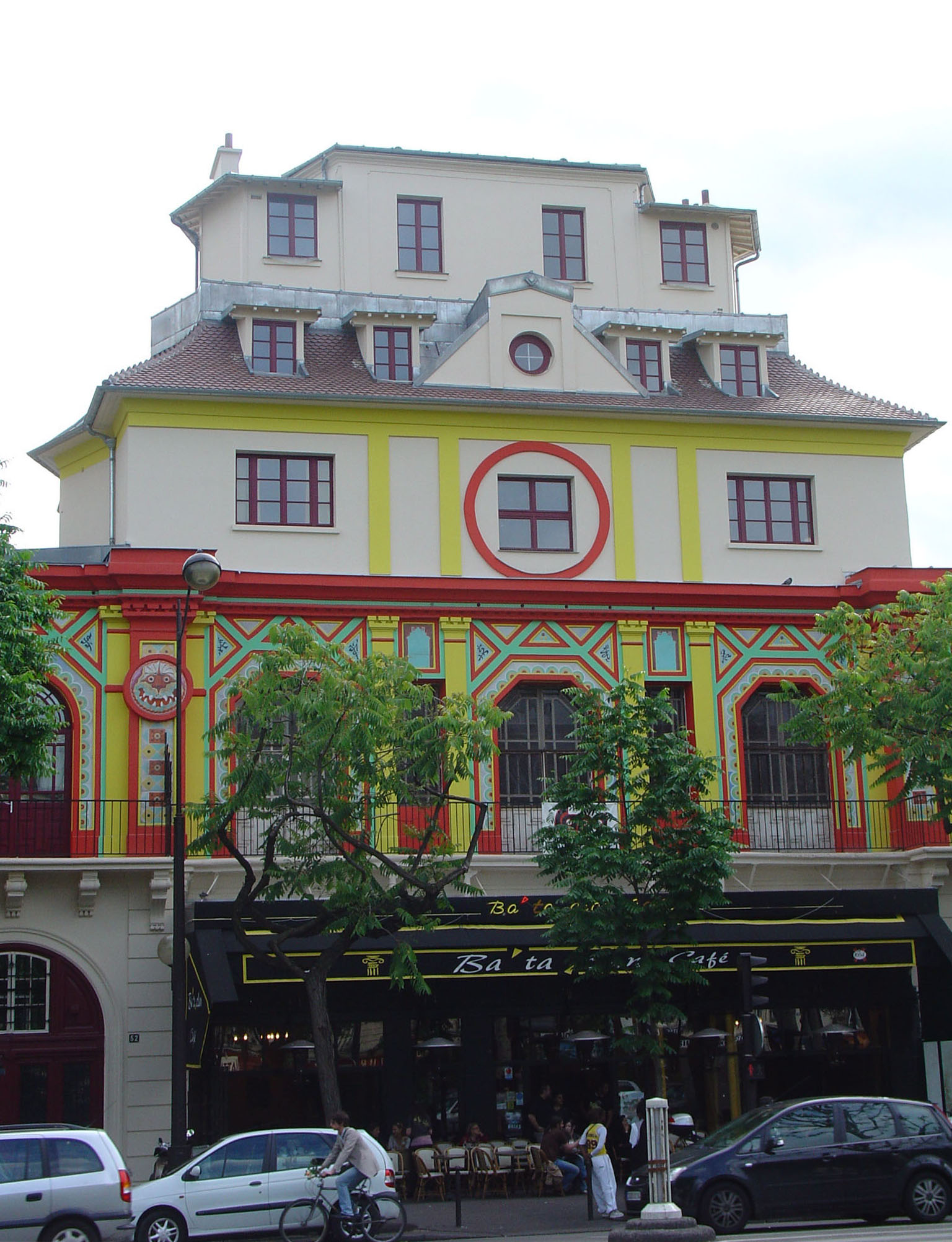 El Bataclán a día de hoy